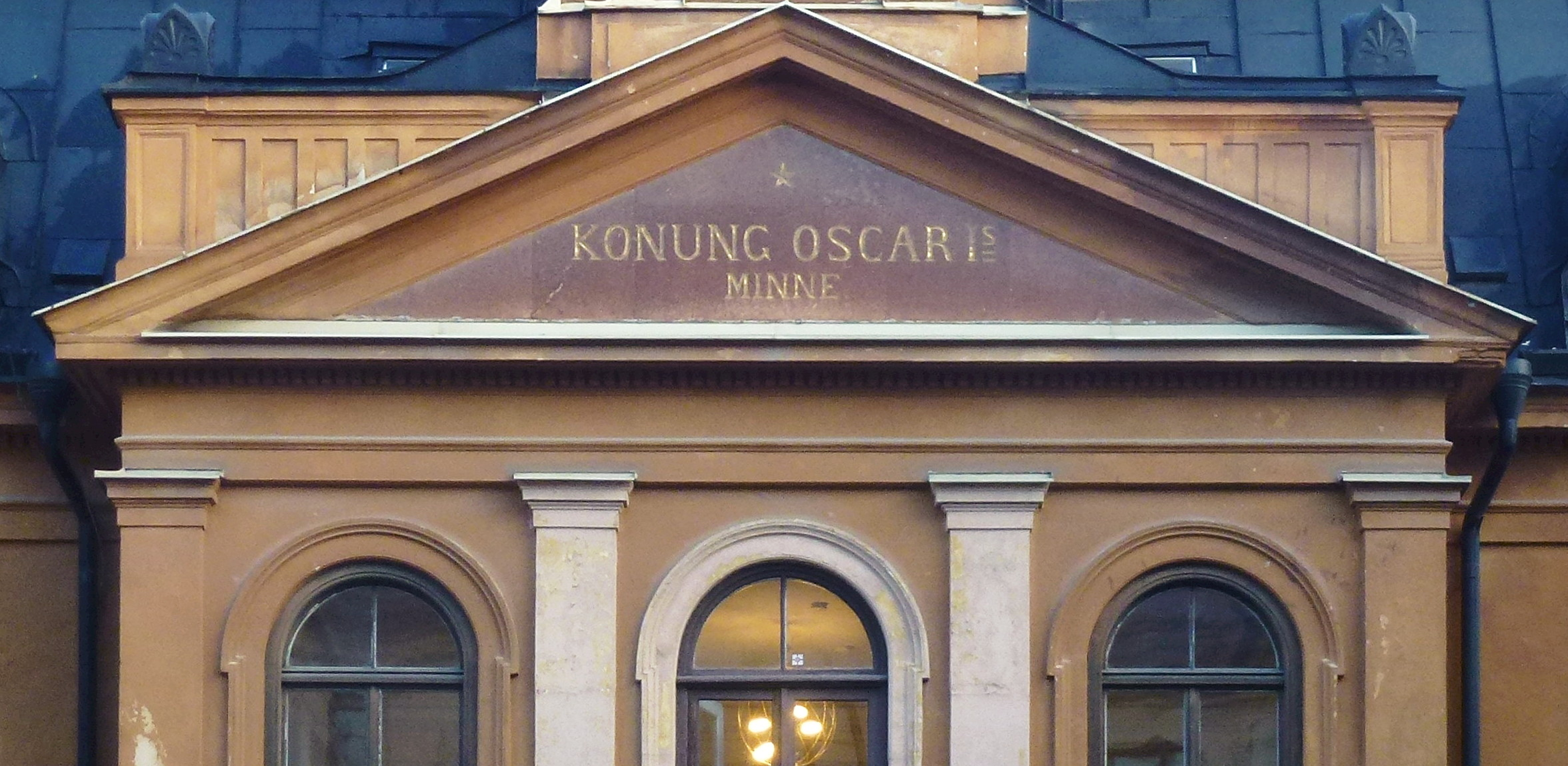 Oscar I:s Minne, tympanon med inskription